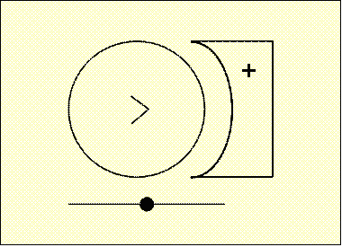 Diagramme de dynamique de forces (exemple), d'après Léonard Talmy